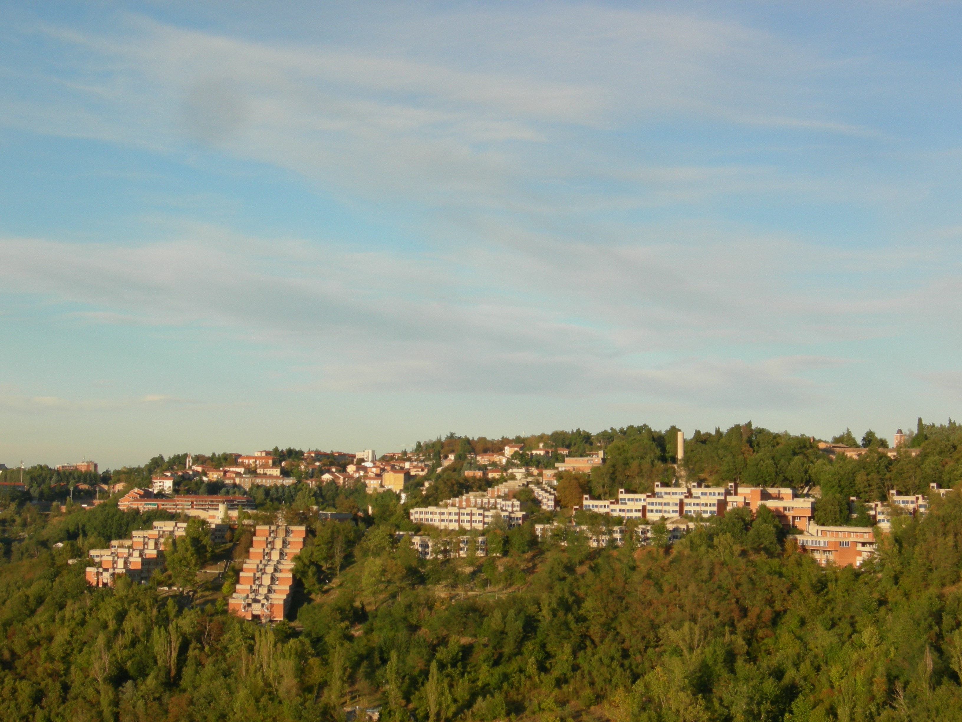 veduta dei Collegi Universitari di Urbino